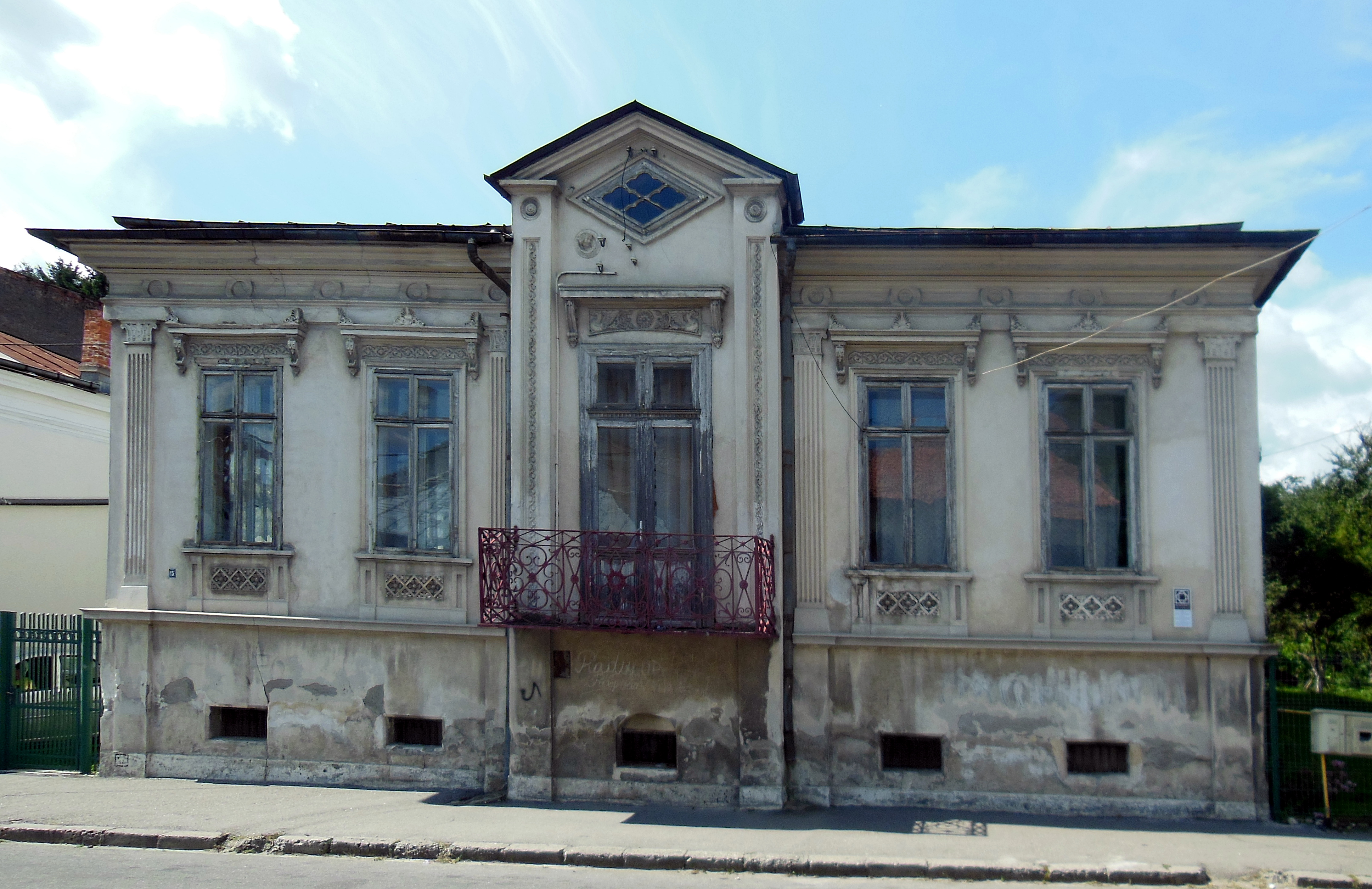 Casa Rizeanu, municipiul Câmpulung, Str. Republicii 15, construită în 1877